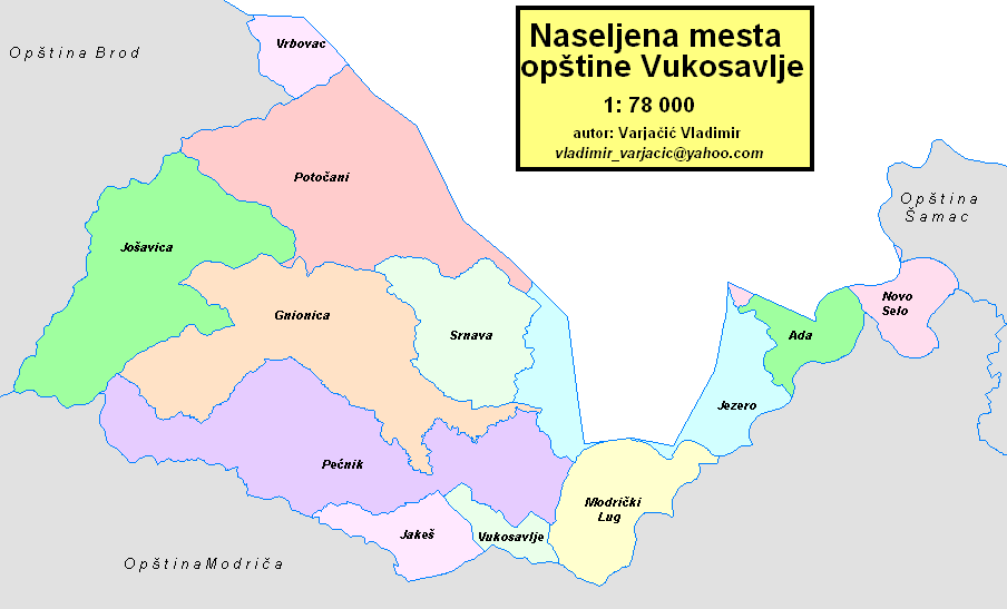 Opština Vukosavlje